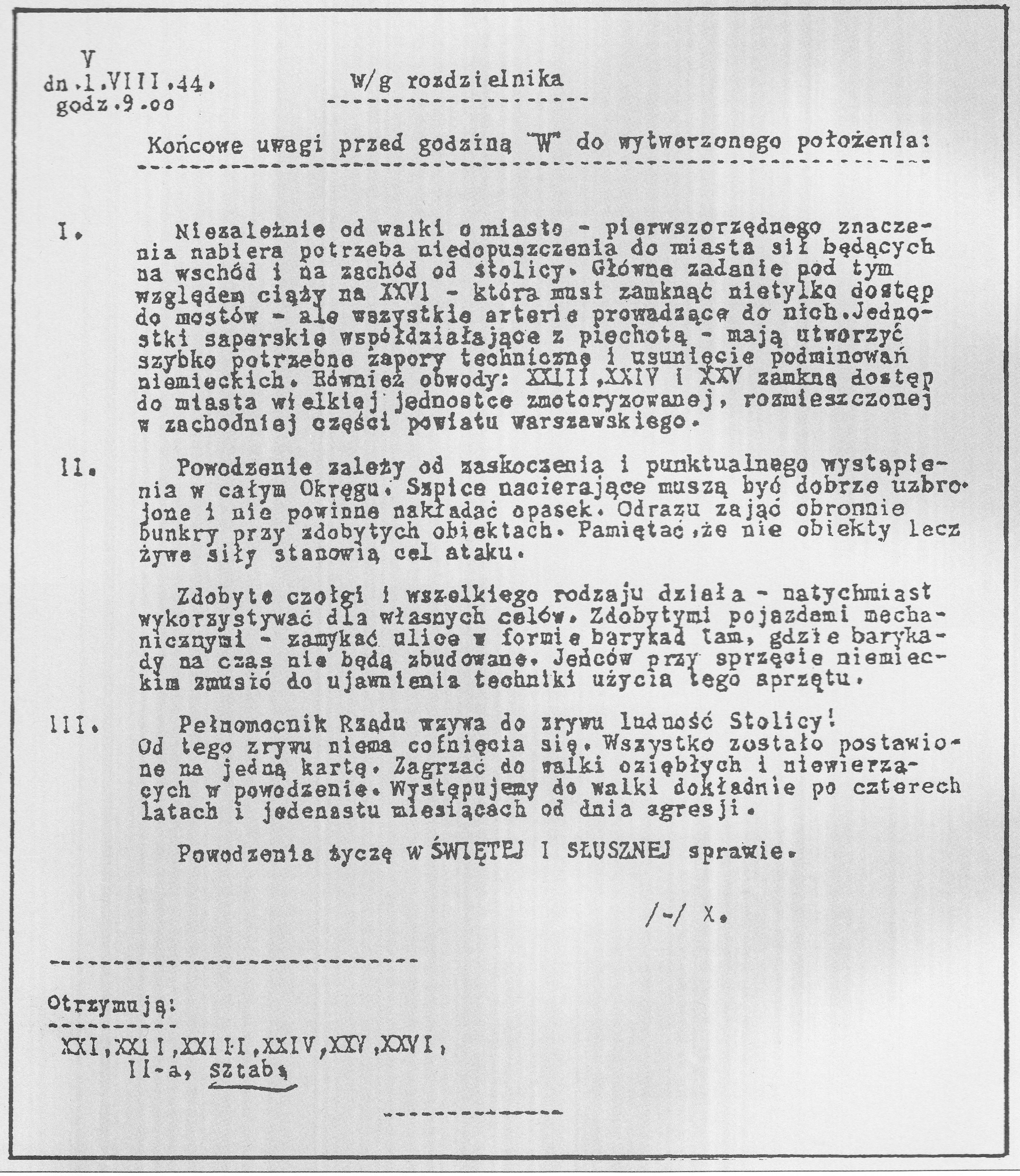 Końcowe uwagi przed godziną W do wytworzonego planu opracowane przez płk. dypl. Antoniego Chruściela